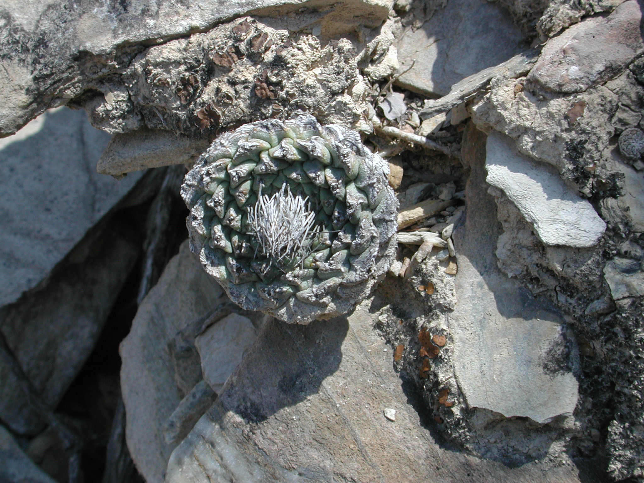 Strombocactus disciformis, near Vizarrón, Querétaro, México.